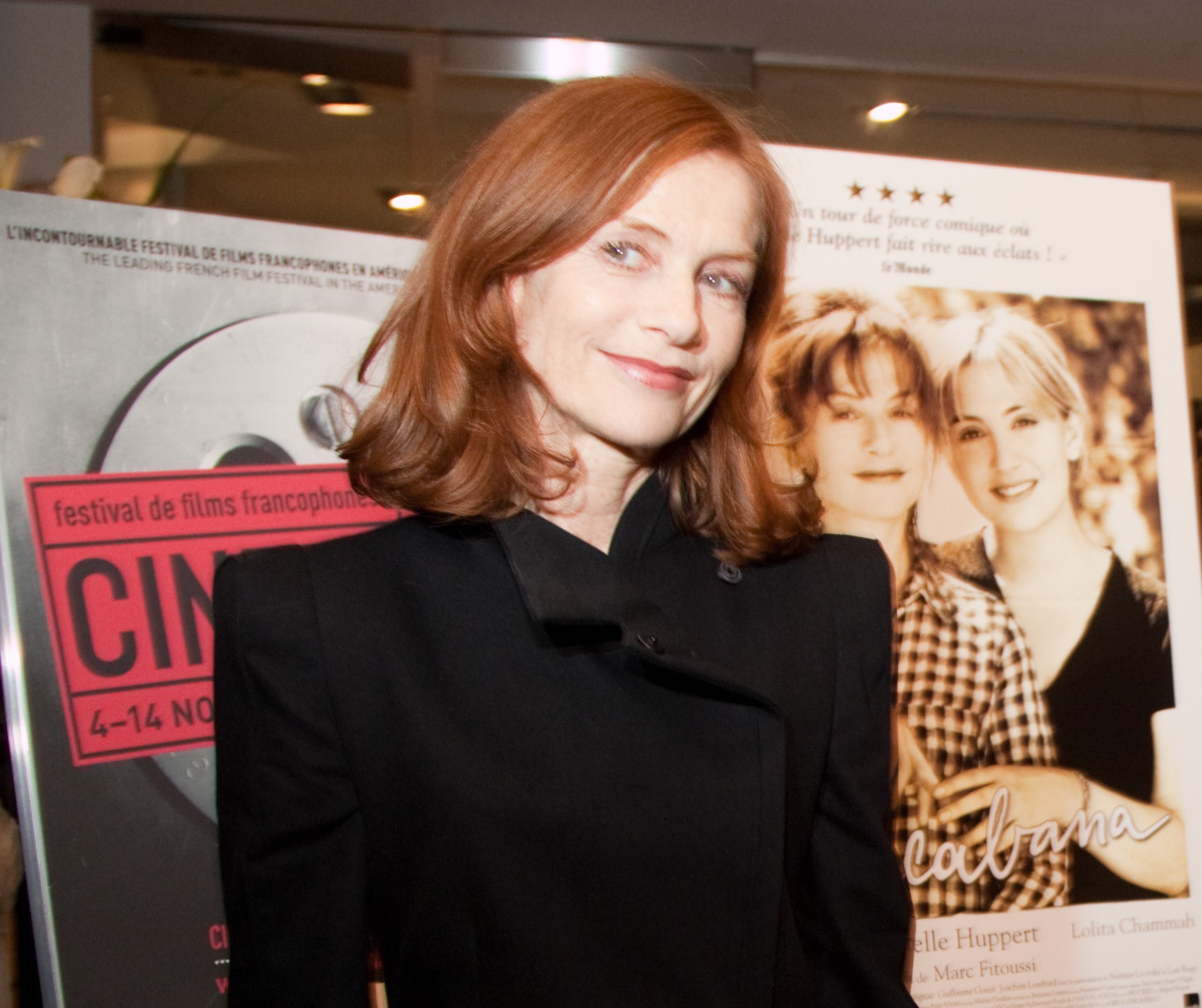 Isabelle Huppert invitée en 2010 à Cinemania